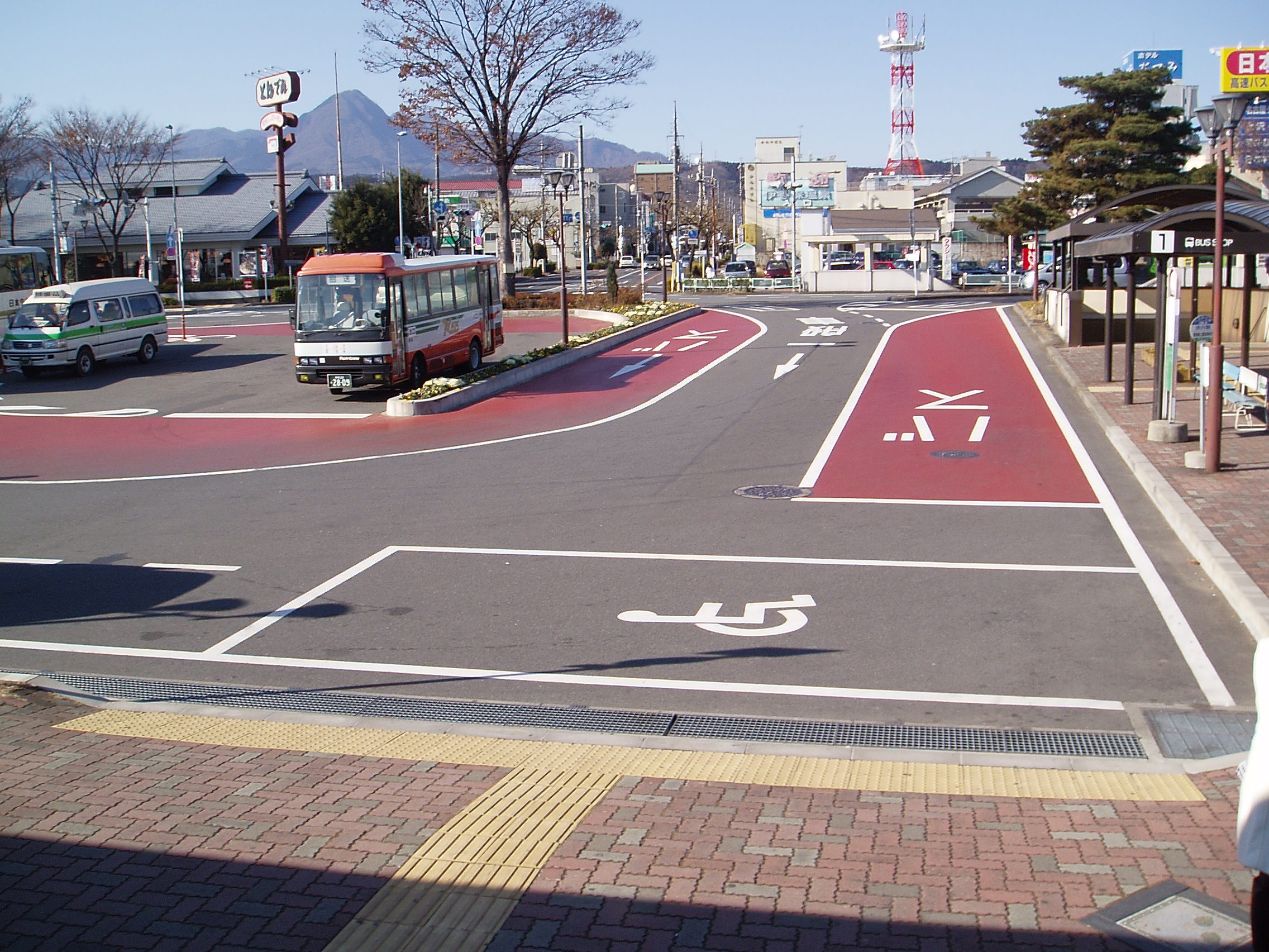 渋川駅の駅前広場